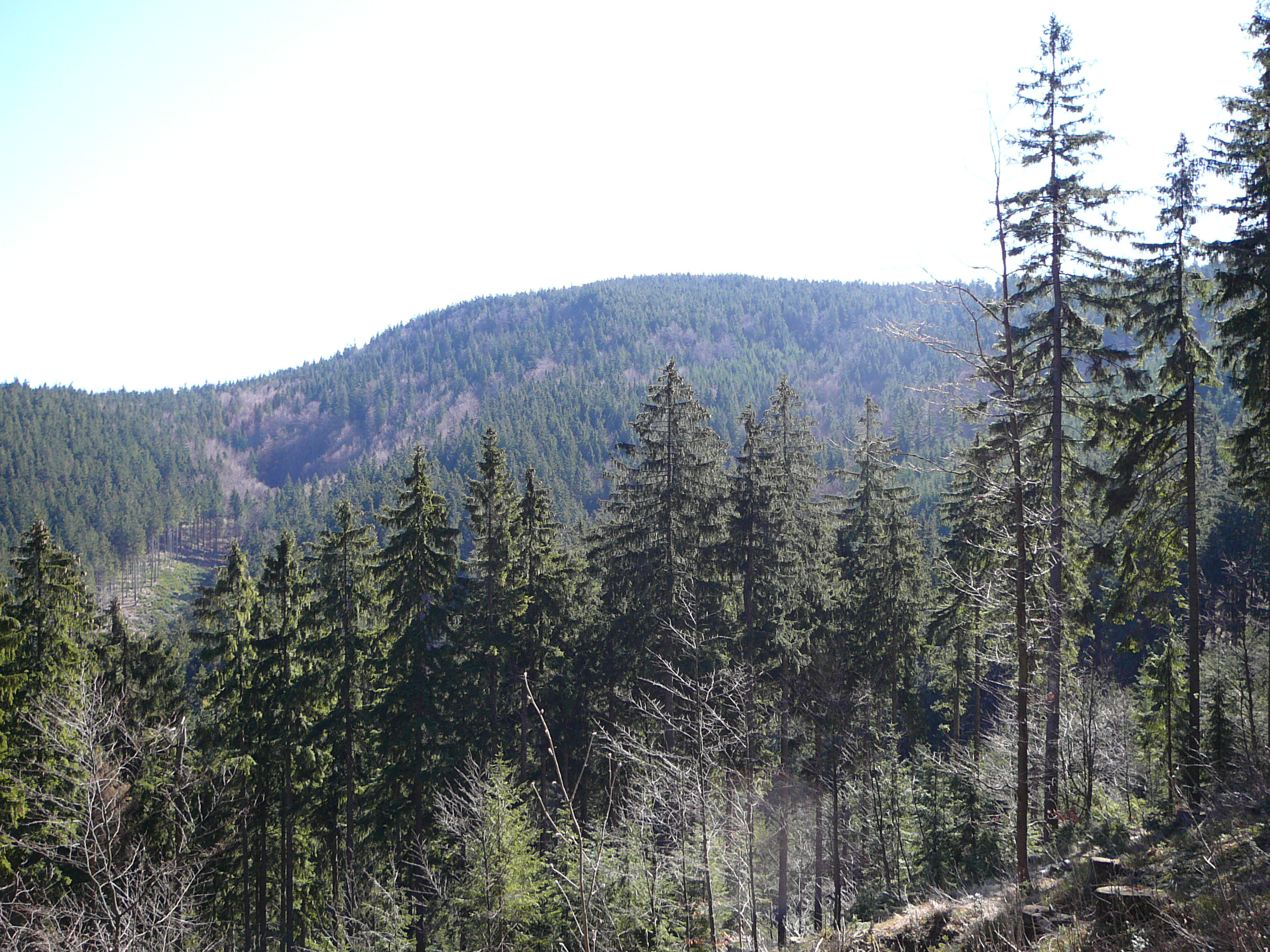 Velký Polom (1067 m), pohled z Muřinkového vrchu